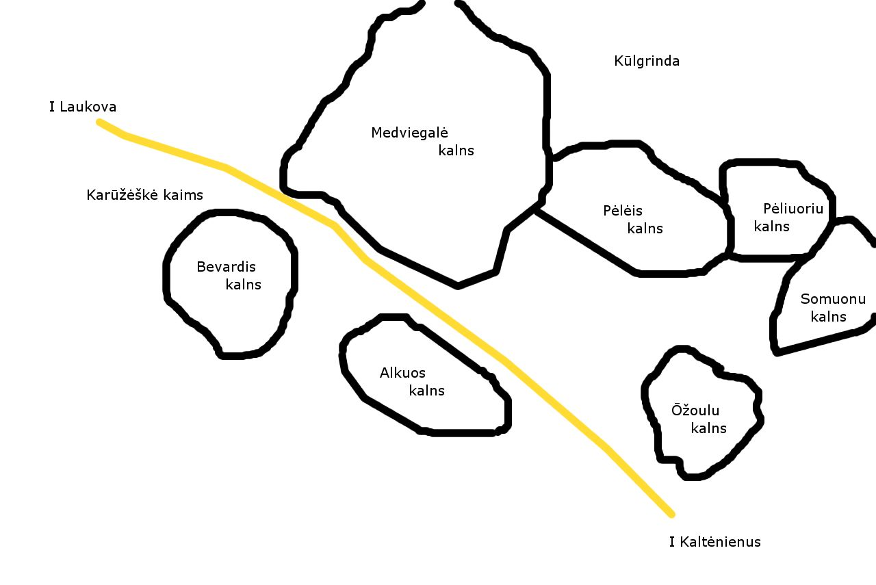 Žemaitėška: Palē plana infuormacėniam skīdė pri patė Medviegalė